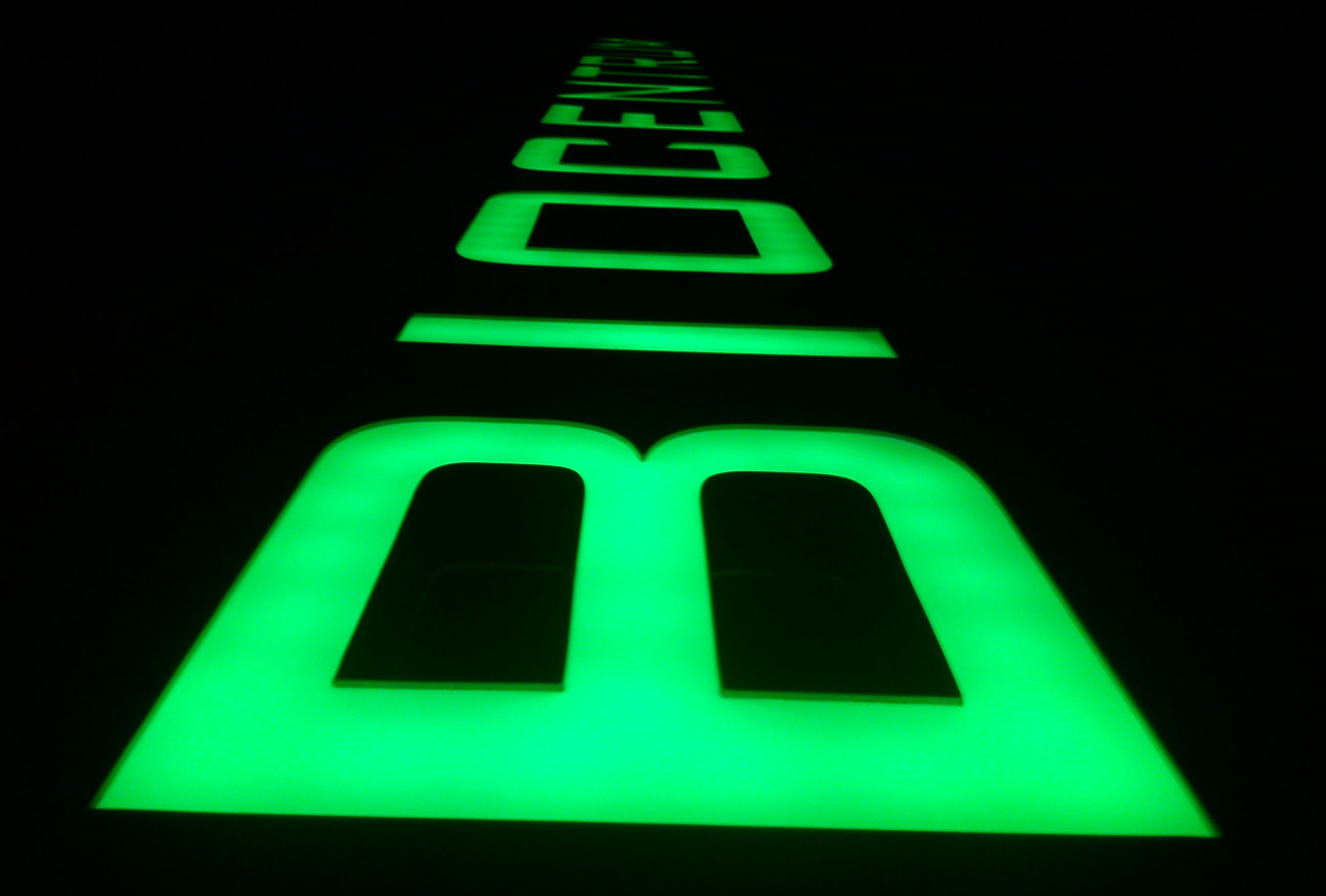 Biocentrum, Poznań, ul. Dojazd.